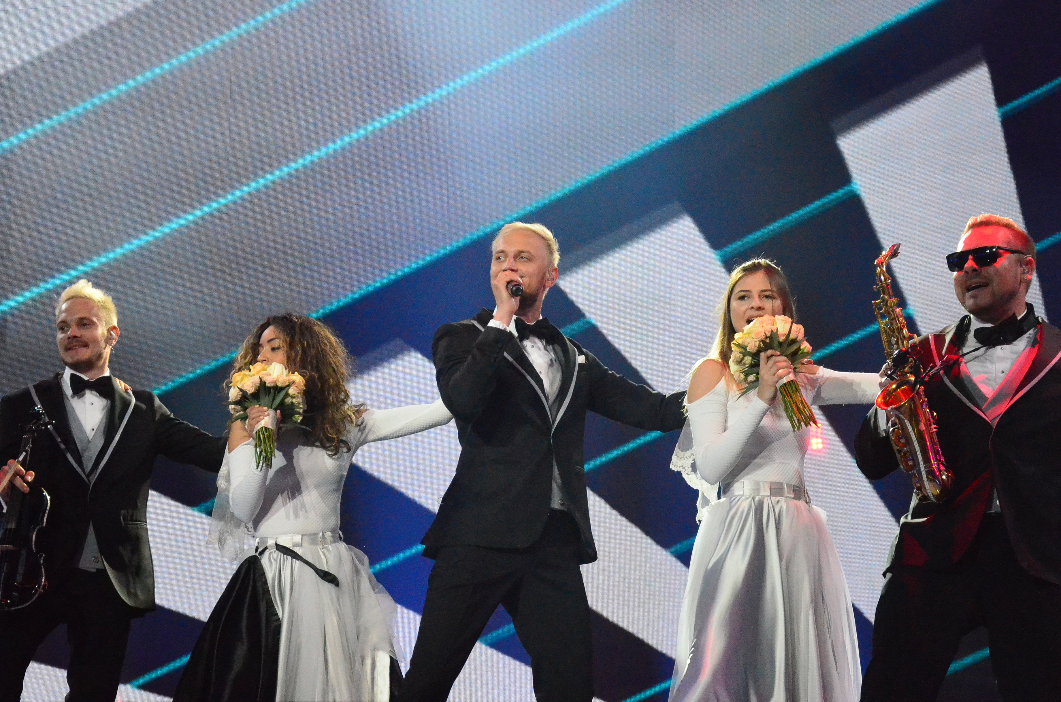 12 травня. Генеральна репетиція фіналу Євробачення 2017. Sunstroke Project (Moldova).